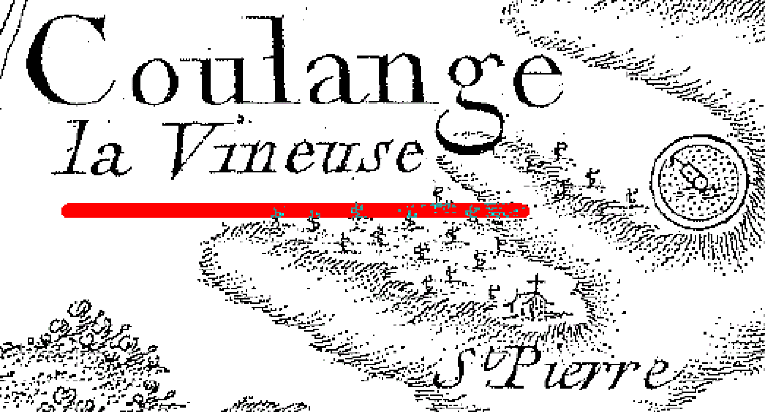 Coulanges-la-Vineuse carte Cassini